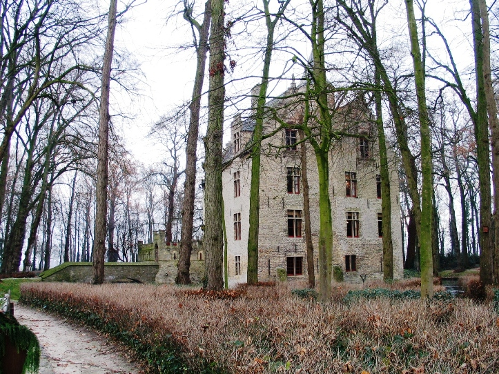 Kasteel Beauvoorde categorie:afbeelding kasteel